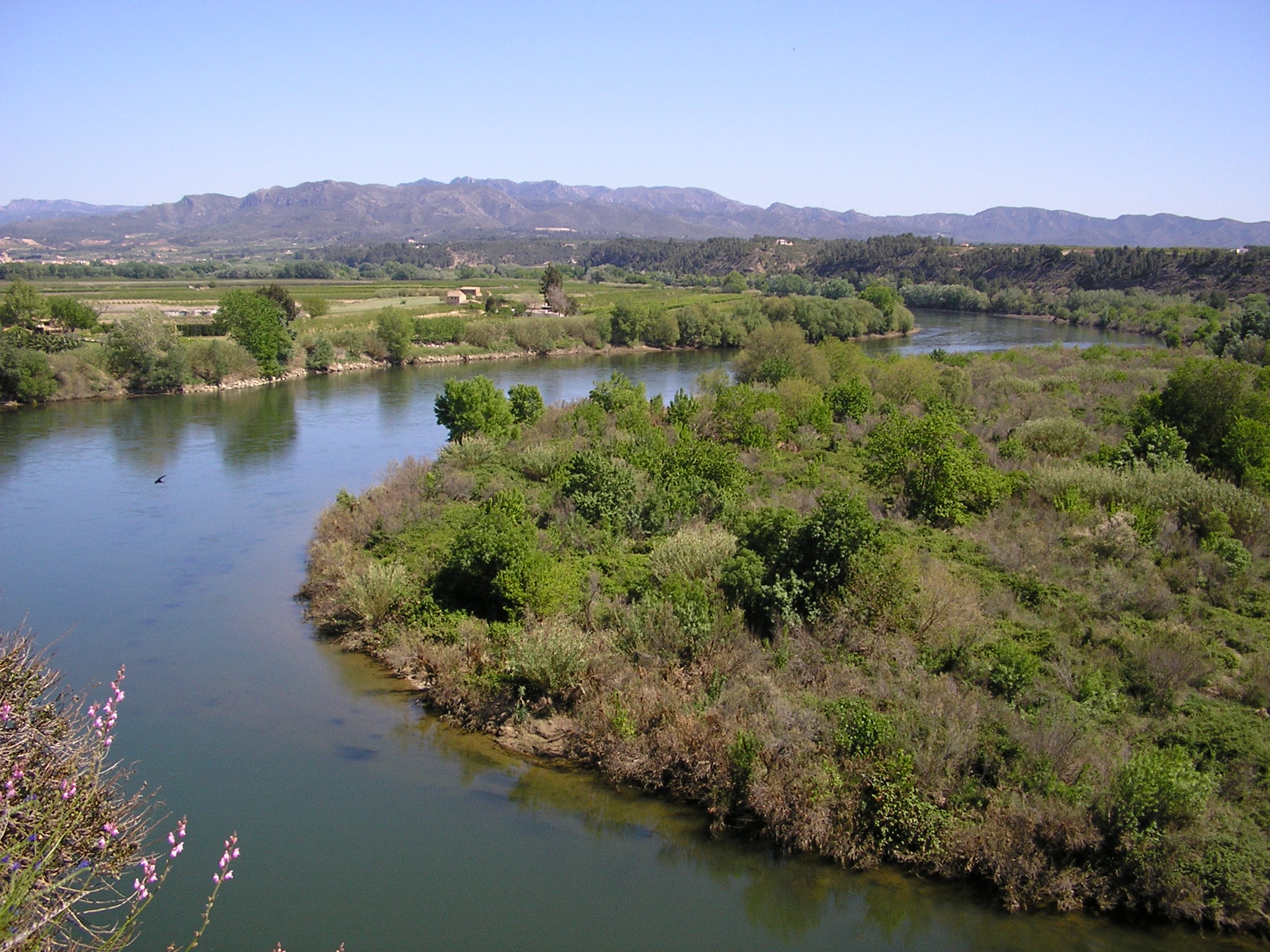 Spain Ebre river in Miravet (Catalunya)